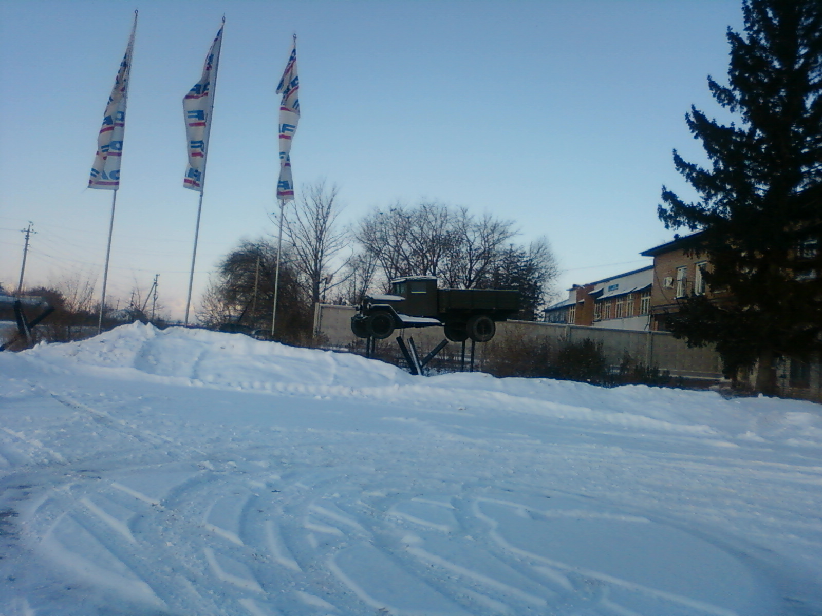 памятник автомобилю ЗиС-5 установлен в районе химзаводов недалеко от улицы Новозаводской, Центрального района города Тольятти